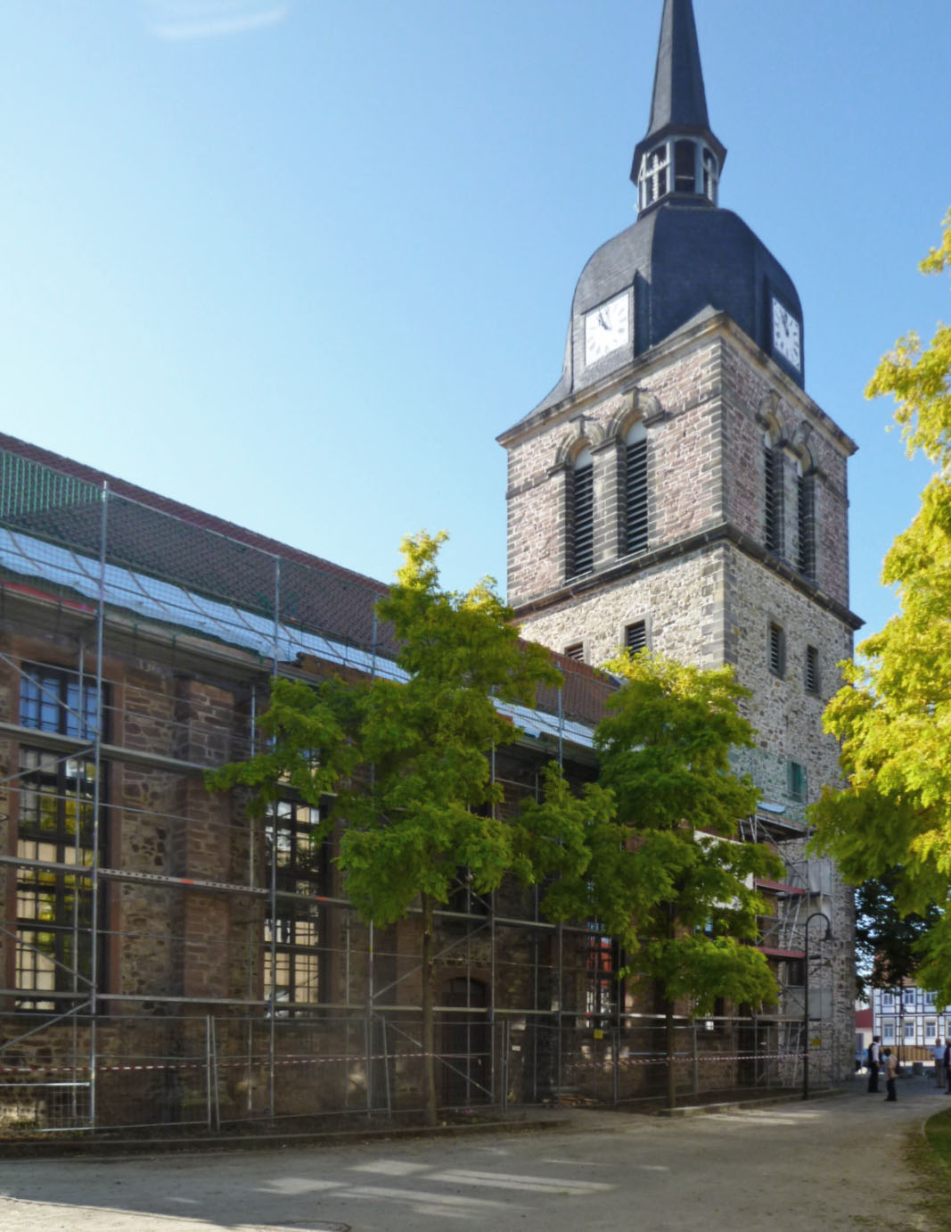 Calvörde, ev. St. Georgs Kirche Bauarbeiten (Decke) 2011, Bild 2